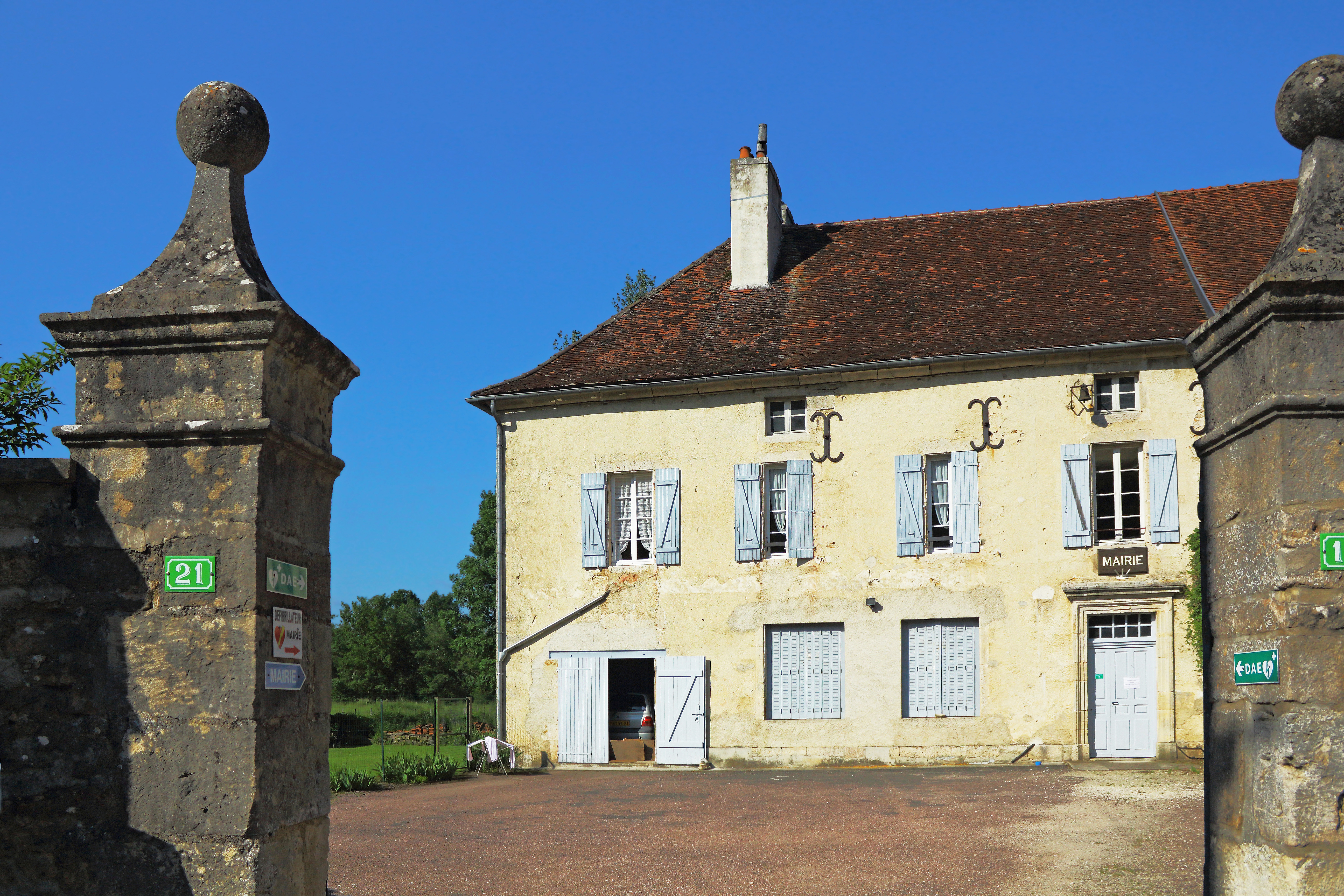 Mairie de Vix